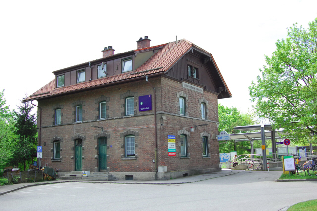 Taufkirchen: Bahnhof, 10 km from München, Deutschland (Zone 32). Taufkirchen ist betrieblich inzwischen zum S-Bahn-Haltepunkt heruntergestuft. Von besseren Zeiten zeugt das stattliche Bahnhofsgebäude, dessen Beschriftung "Taufkirchen-Unterhaching" seine einst überörtliche Bedeutung zeigt.